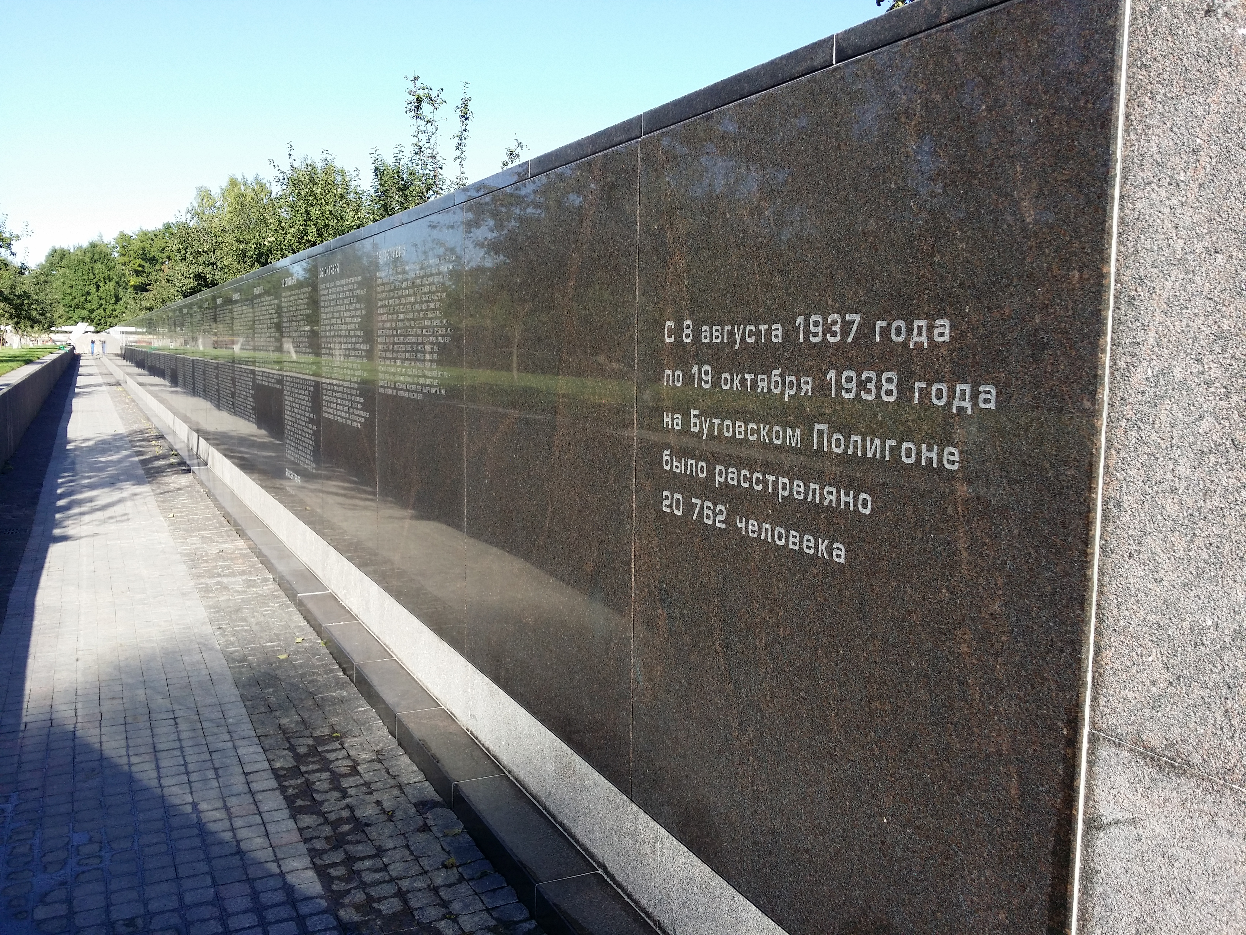 Бутовский полигон: Юбилейная улица, Дрожжино, Ленинский район, Московская область